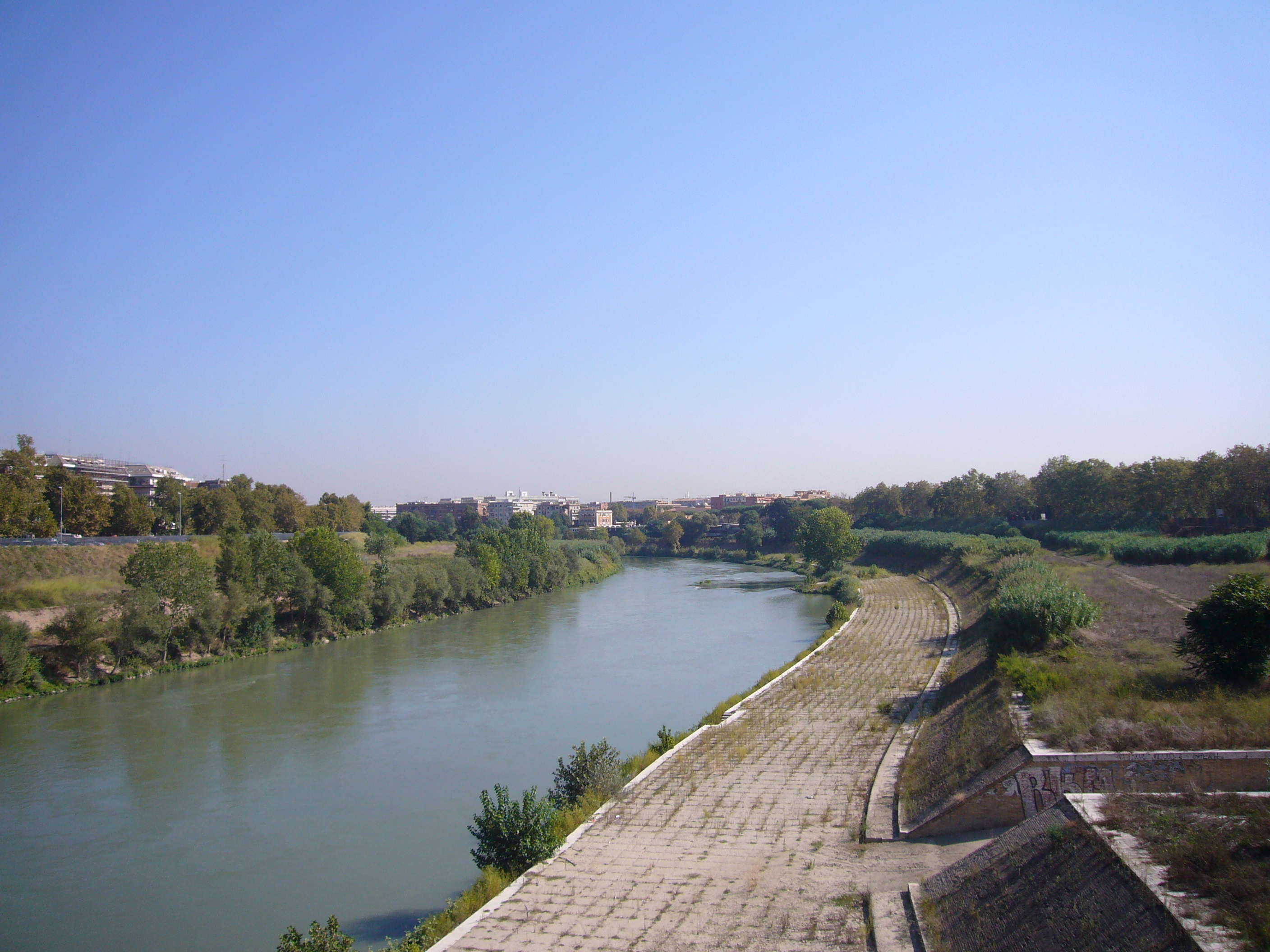 Roma, lungotevere di san Paolo